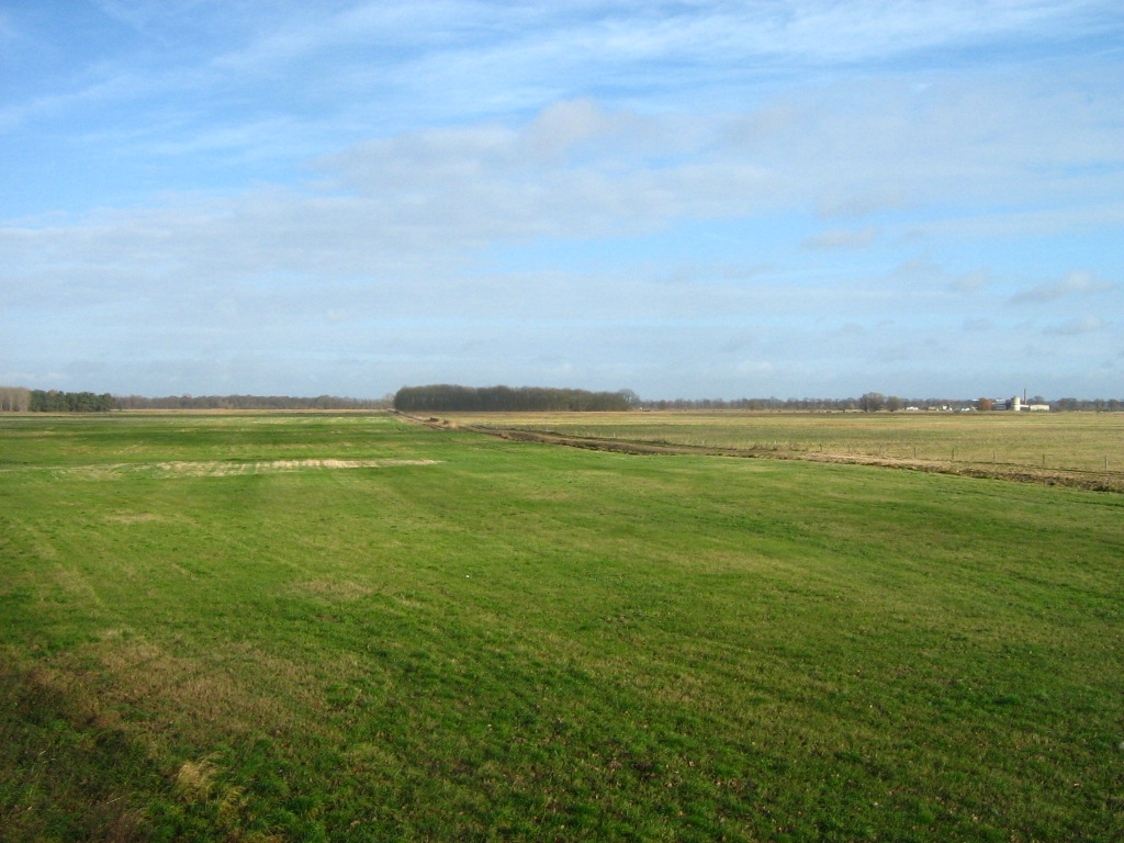 Das Havelländiche Luch (Landkreis Havelland, Brandenburg) - OpenStreetMap(Info)